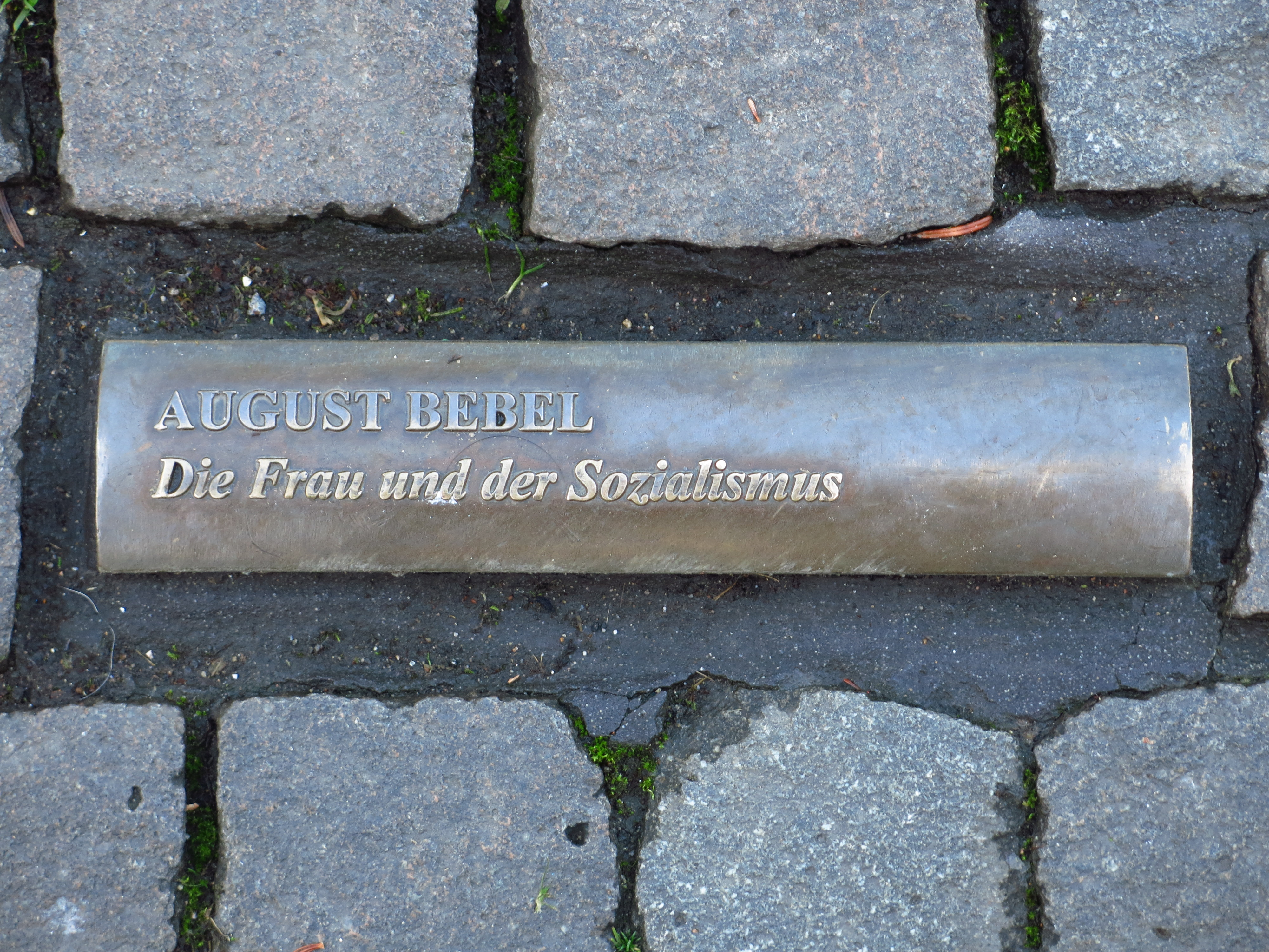 Das Mahnmal zur Bücherverbrennung auf dem Bonner Markt; In das Pflaster des Bonner Markt sind insgesamt 60 sichtbare Buchrücken, sogenannte „Lesezeichen“, verteilt, die sich an der Rathaustreppe, dem Ort an dem die Bücher am 10. Mai 1933 verbrannt wurden, verdichten. Zusätzlich wurde ein wetterfester Archiv-Behälter in Form einer Büchertruhe in den Platz eingelassen. Seine Inschrift benennt das Ereignis und weitere Autoren von verbrannten Büchern.